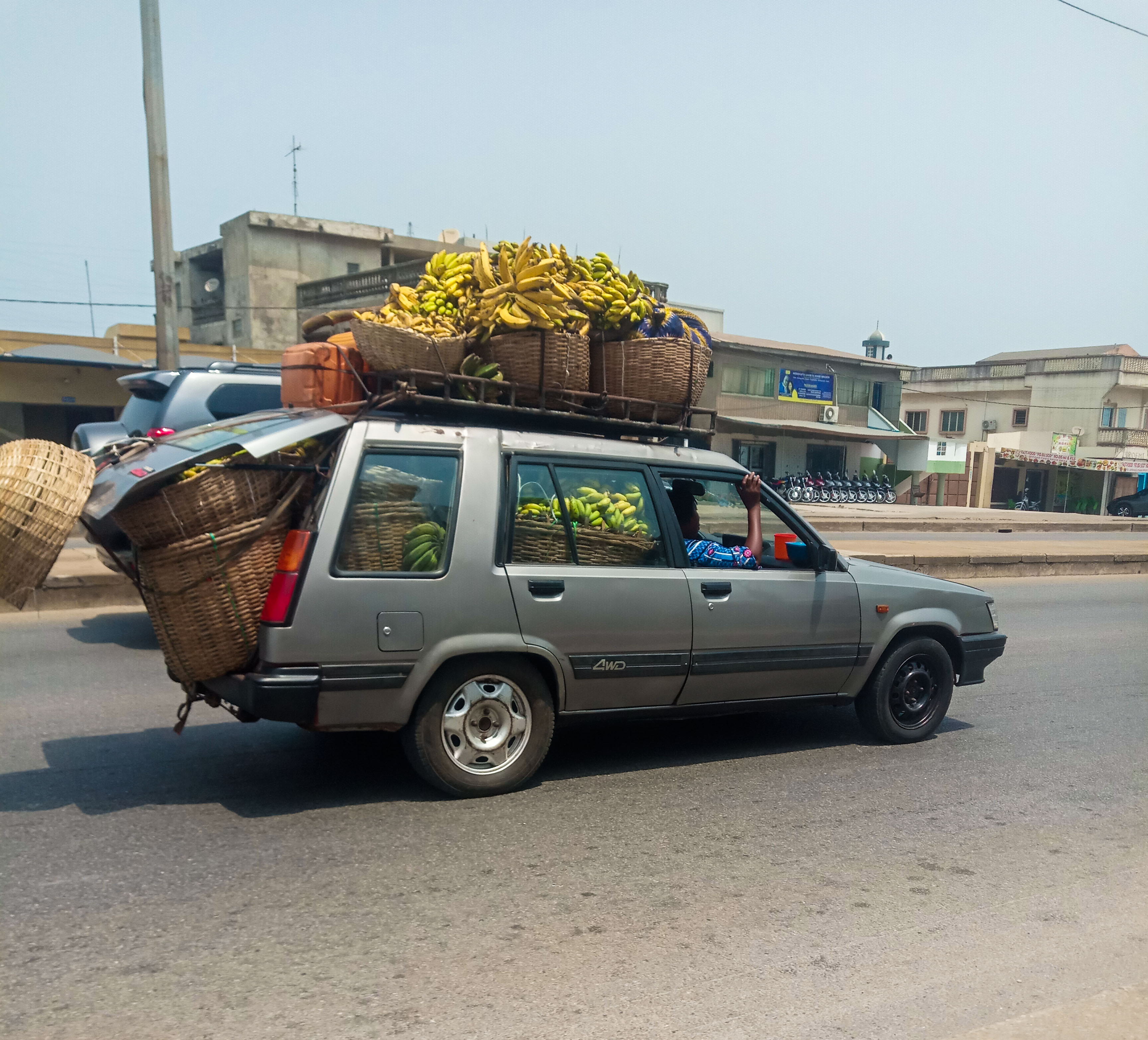 Taxi brousse transportant des fruits pour la ville This is an image with the theme "Africa on the Move or Transport" from: Benin